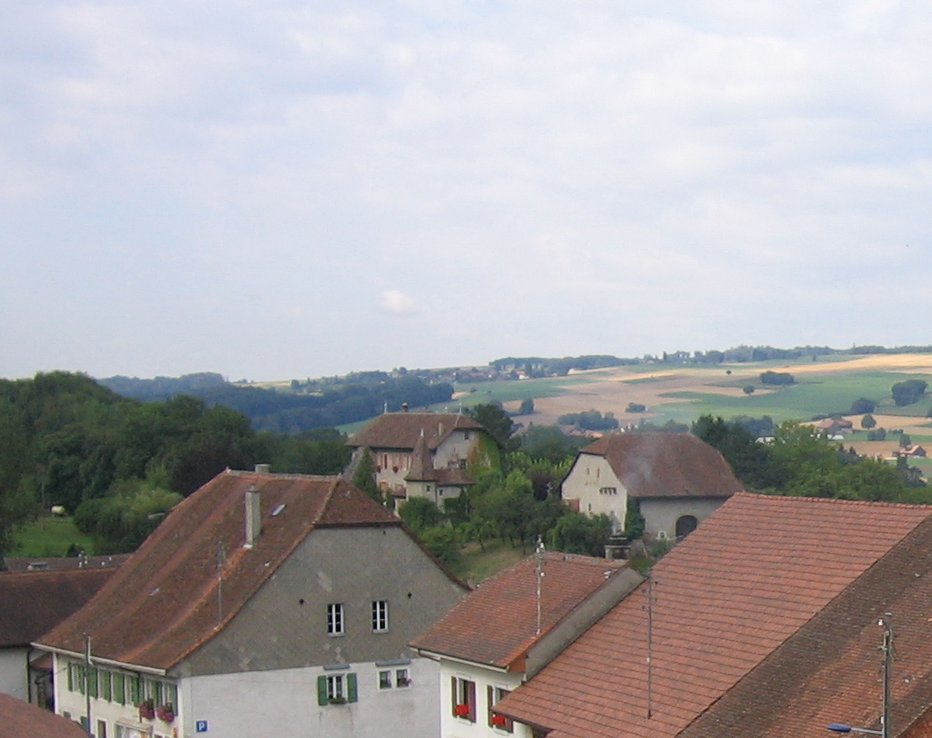 Chateau de Bioley-Magnoux